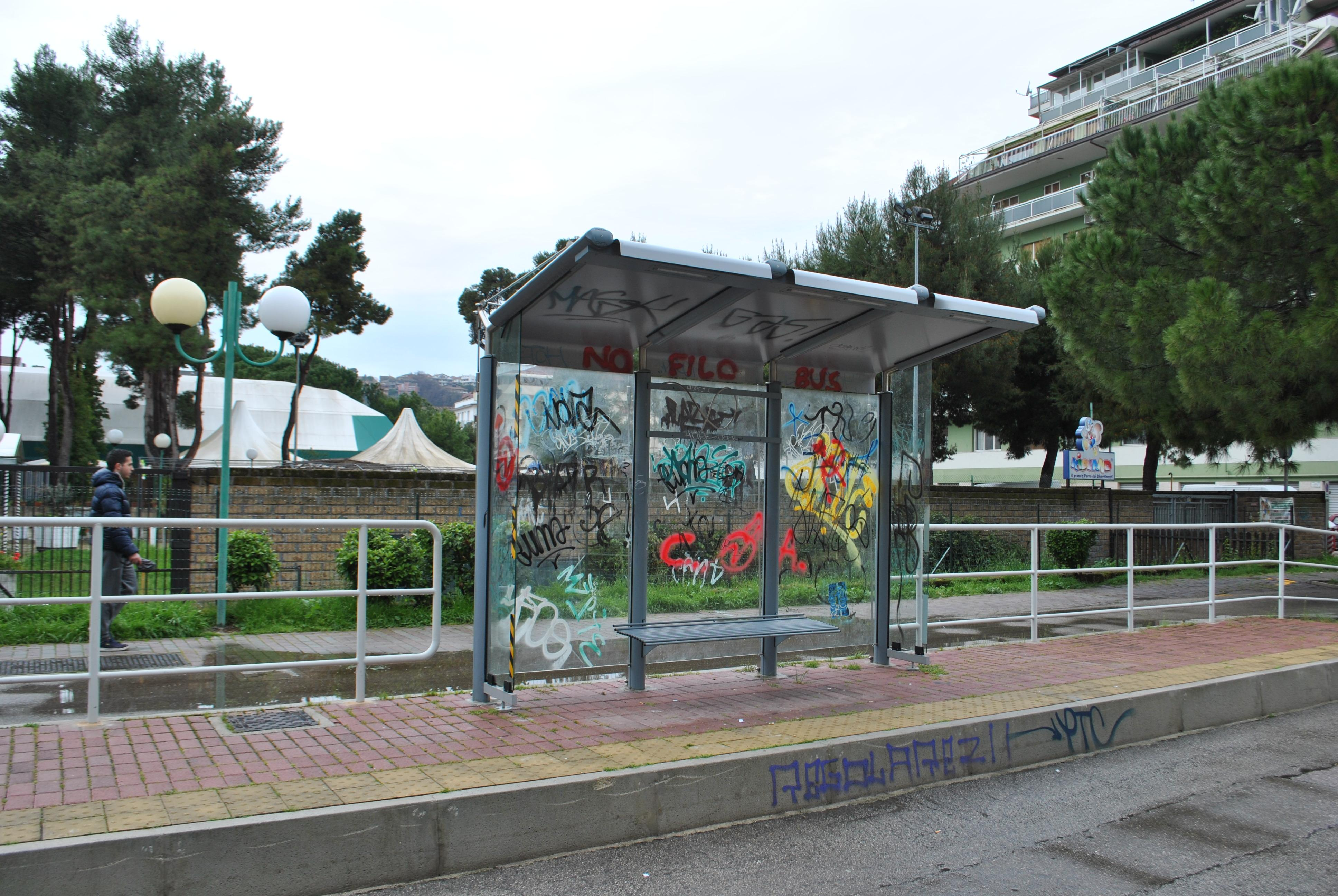 Fotografia della prevista fermata "Gioberti" a Pescara